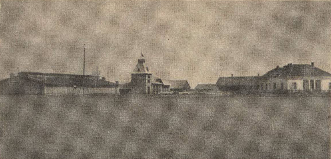 Беларуская (тарашкевіца): Беняконі (Bieniakoni)